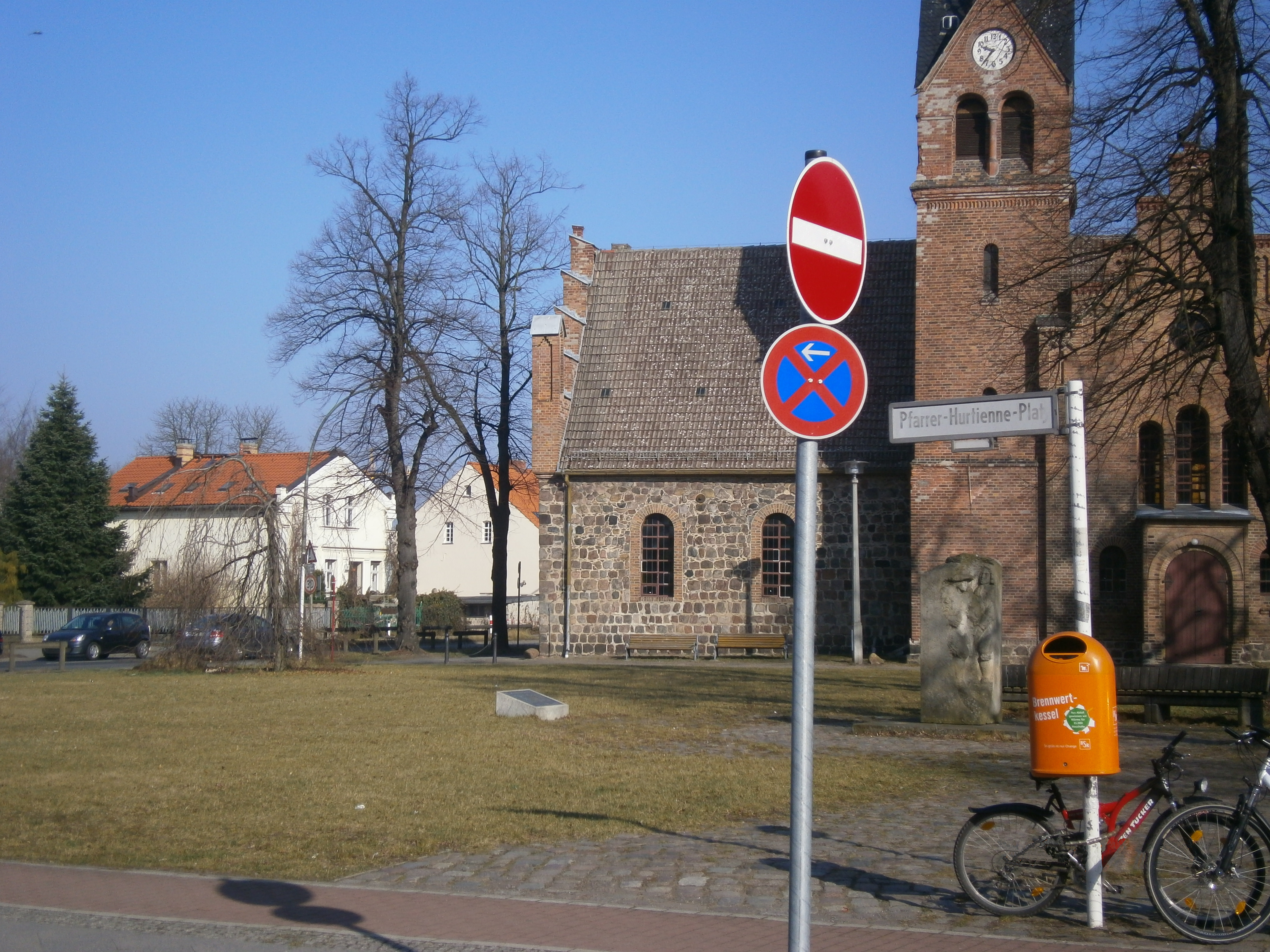 Der Pfarrer-Hurtienne-Platz in Berlin-Französisch Buchholz, es ist der Platz südlich der Dorfkirche in ein Teil des vormaligen Dorfanger an der Kreuzung der Haupt-(vormals Dorf-)straße mit der Mühlen- und Grave